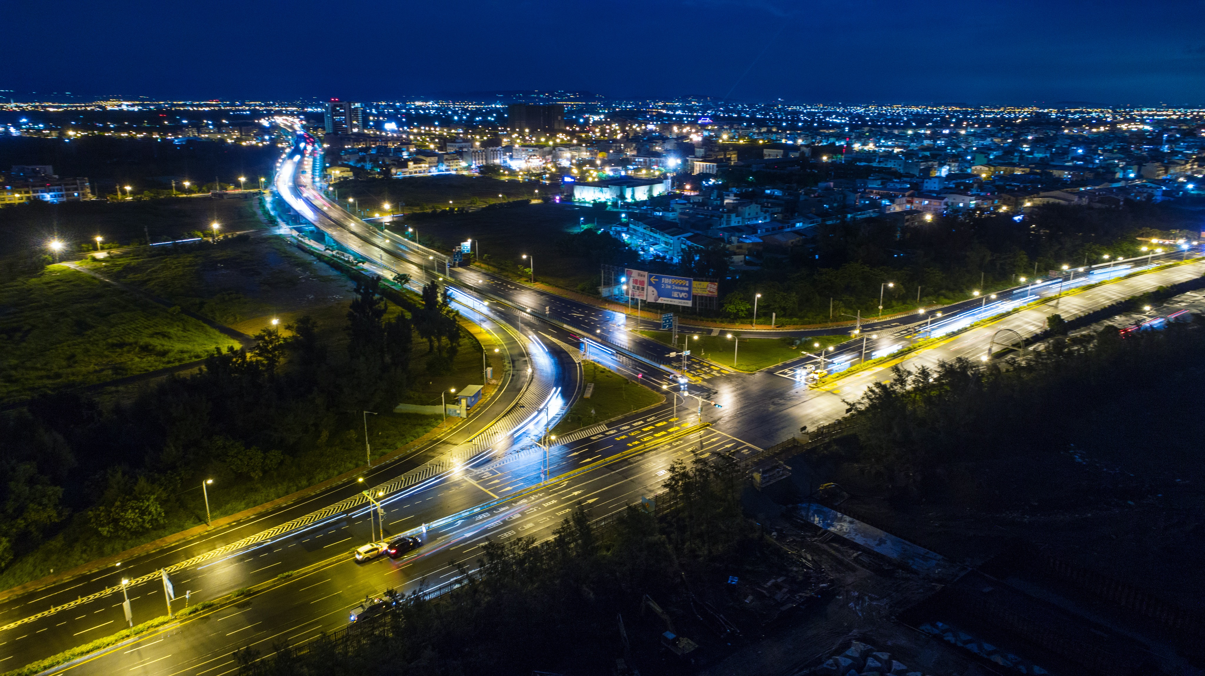 中文（台灣）: 夜間的臺86線與西部濱海公路�